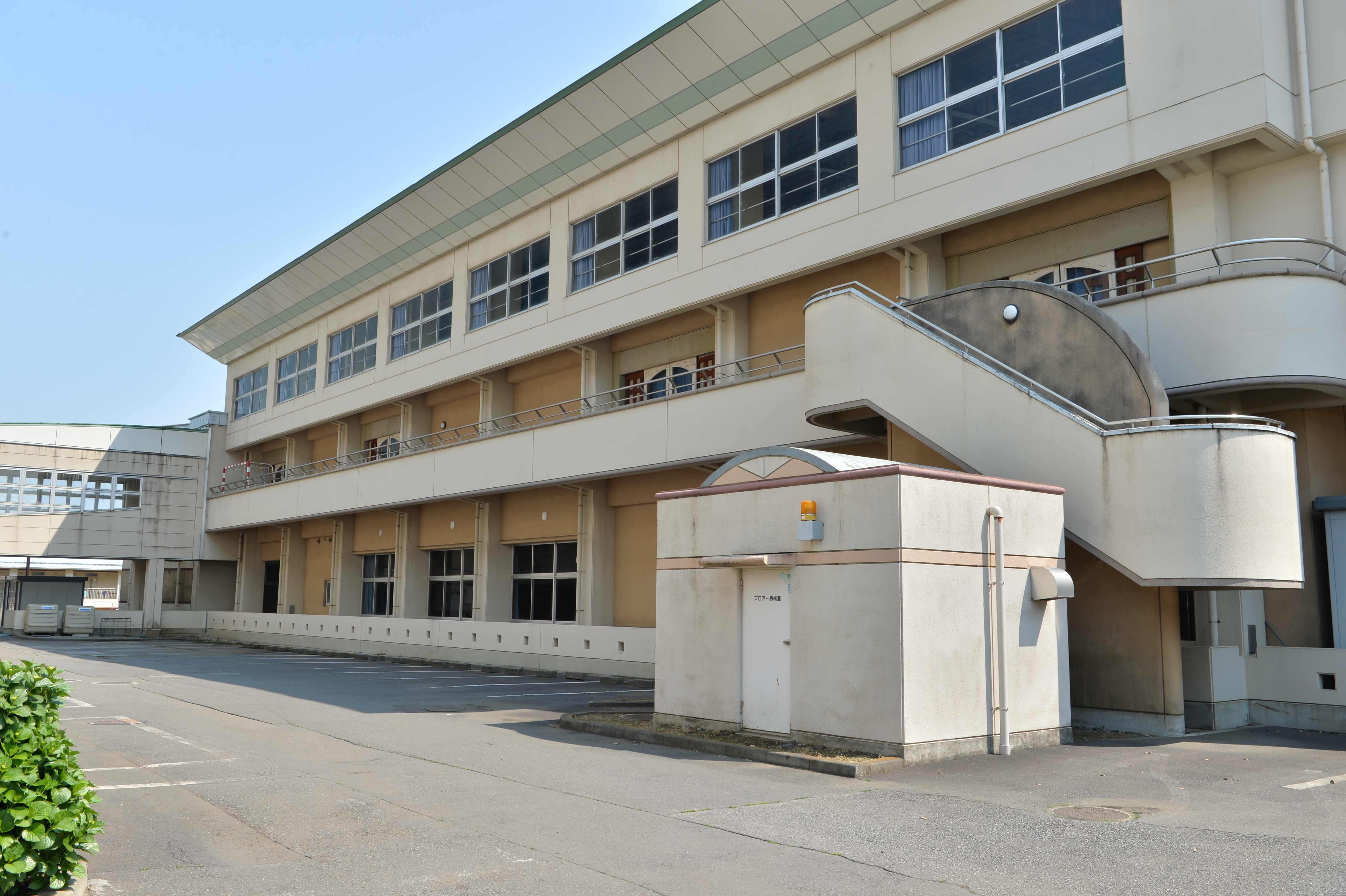 複層式の体育館。1階：柔道場・剣道場・トレーニングルーム、2階：体育館アリーナ。創立95周年記念事業として、1996年竣工。